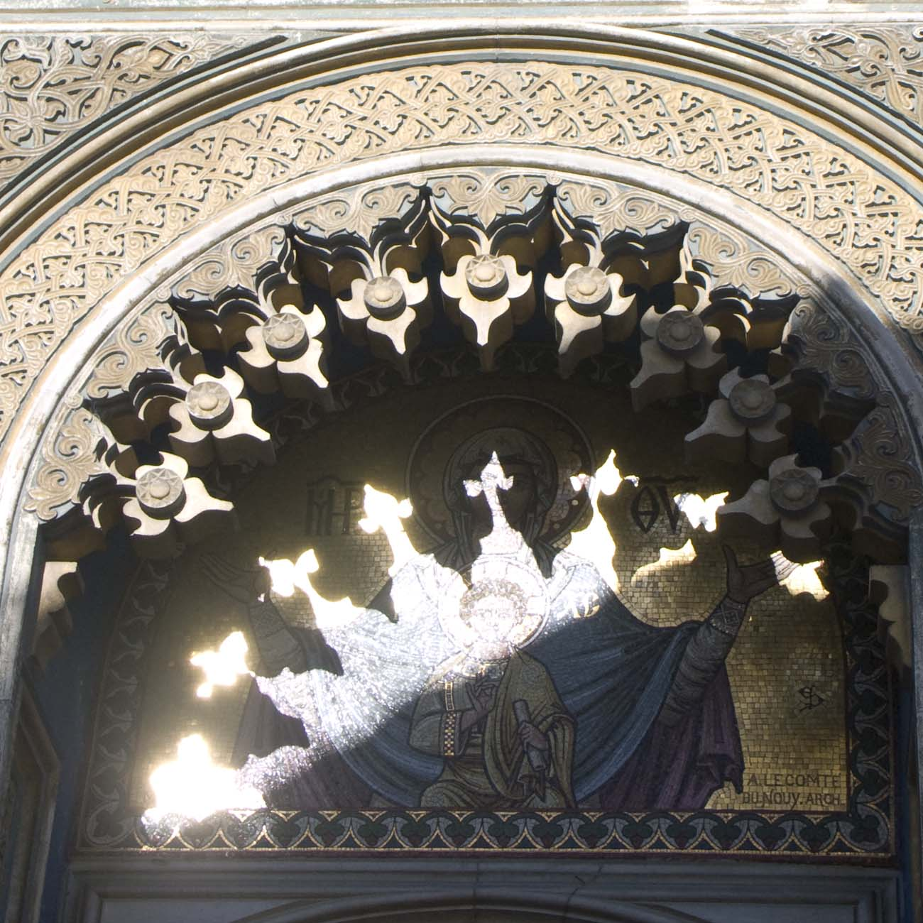 Curtea de Argeş, biserica mănăstirii, nişă peste intrare cu mozaic semnat de arhitectul A. Lecomte.